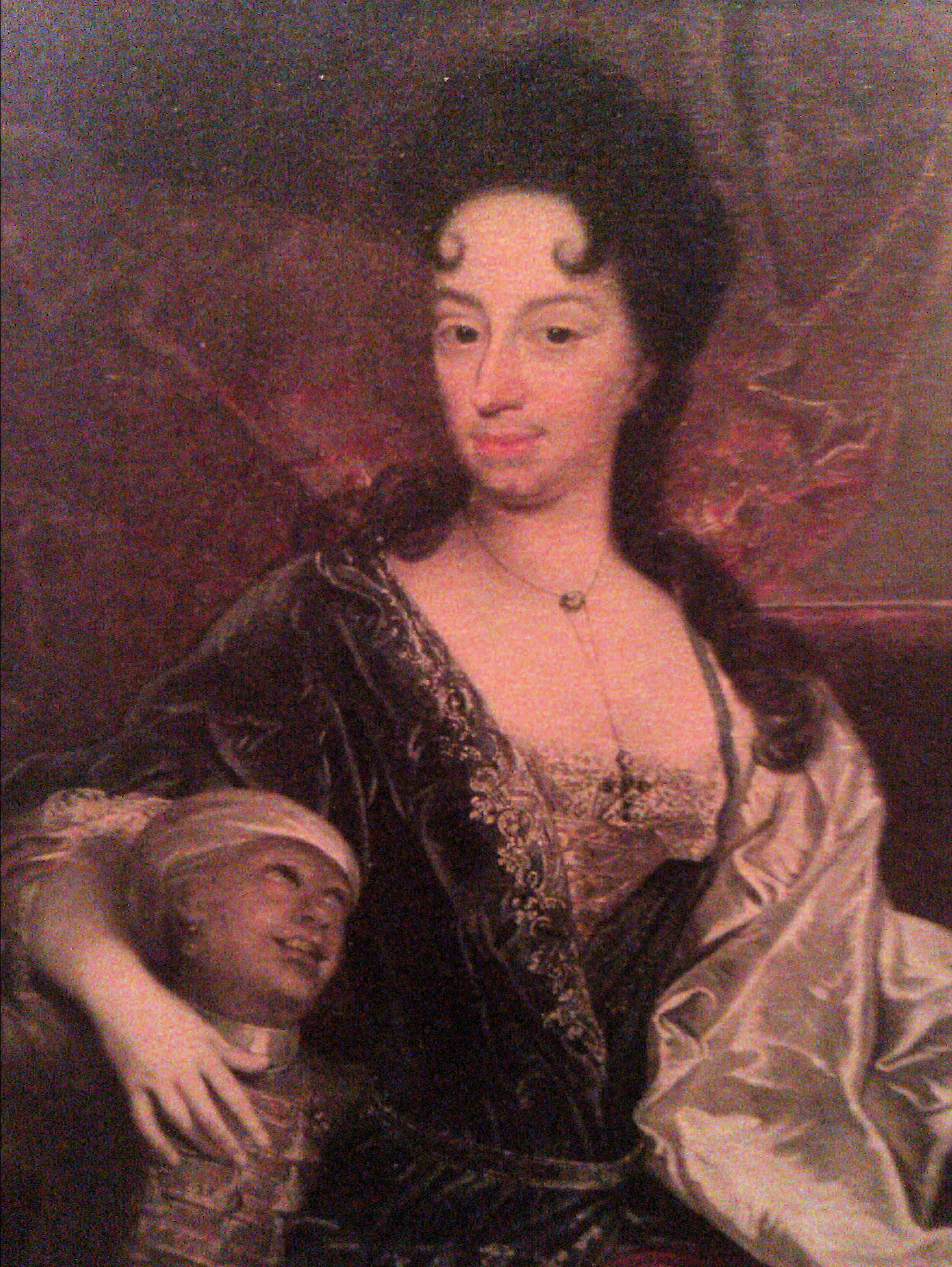 Dorothea Krag (1675–1745), adelskvinde og generalpostmester, fra Post- og Telemuséet, København